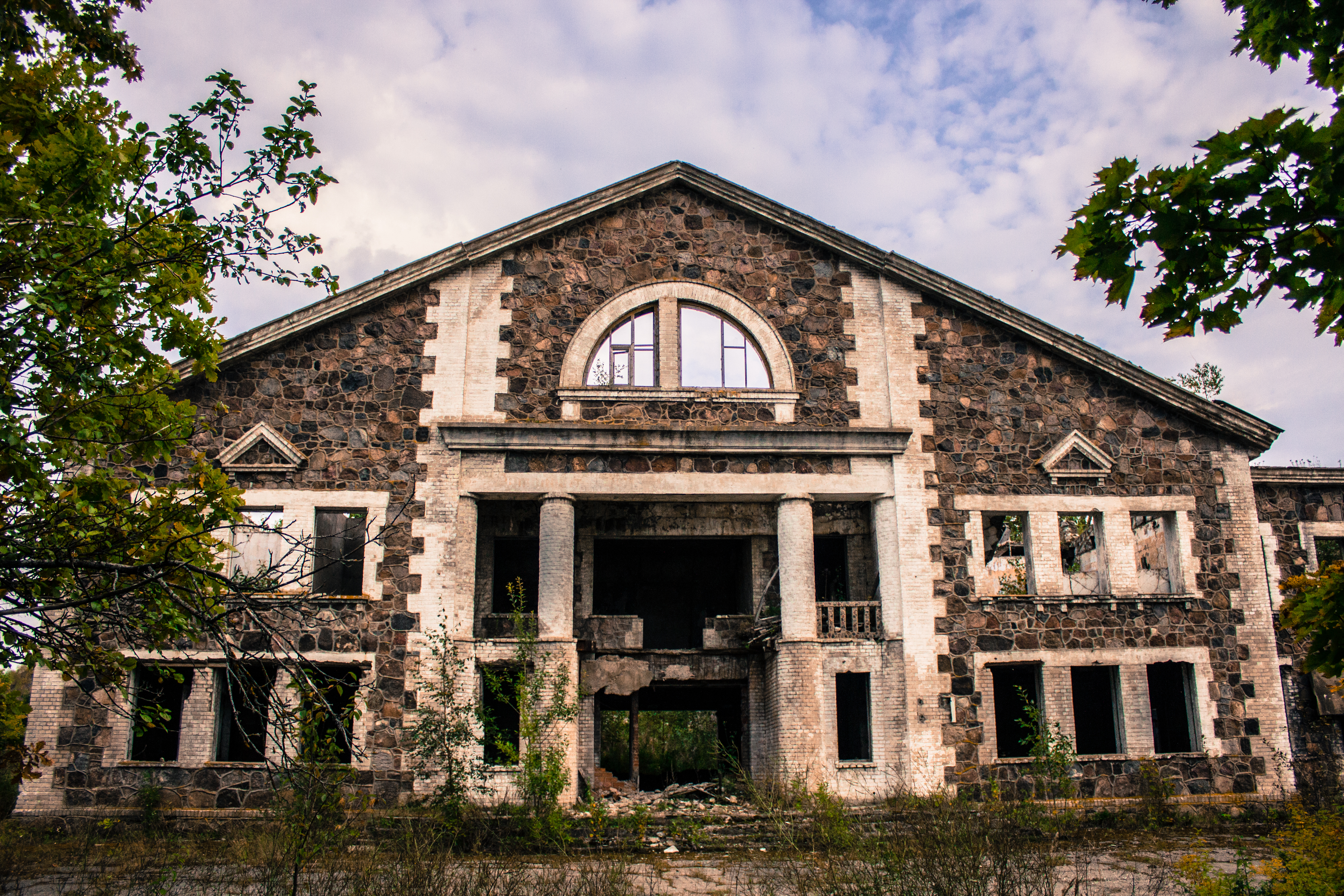 Sompa kaevanduse hoone, 1946-1948